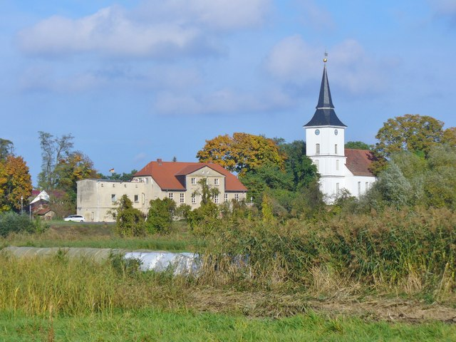 Dyrotz